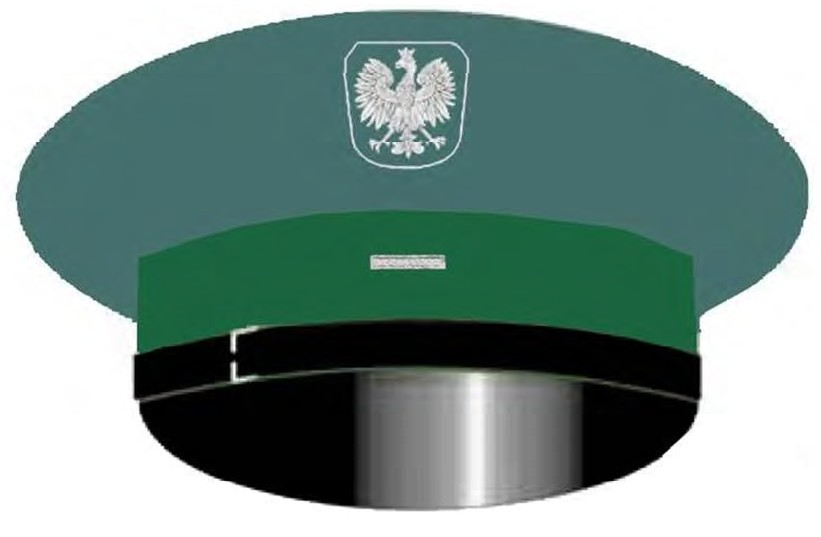 Czapka garnizonowa funkcjonariusza ITD